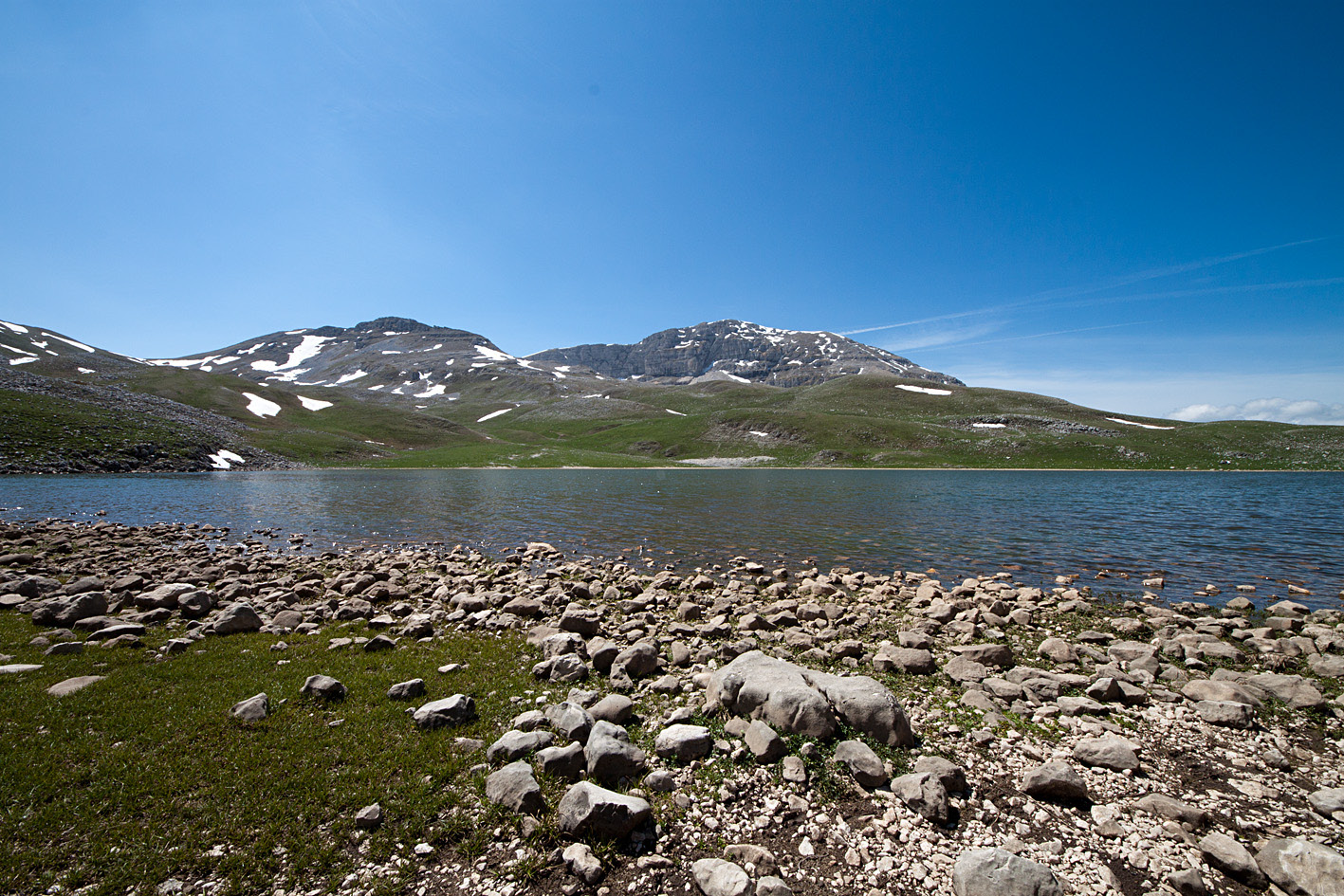 Lago della Duchessa - 1802 m s.l.m. (RI), sullo sfondo il Murolungo - 2184 s.l.m.